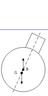 Eigen ontwerp.